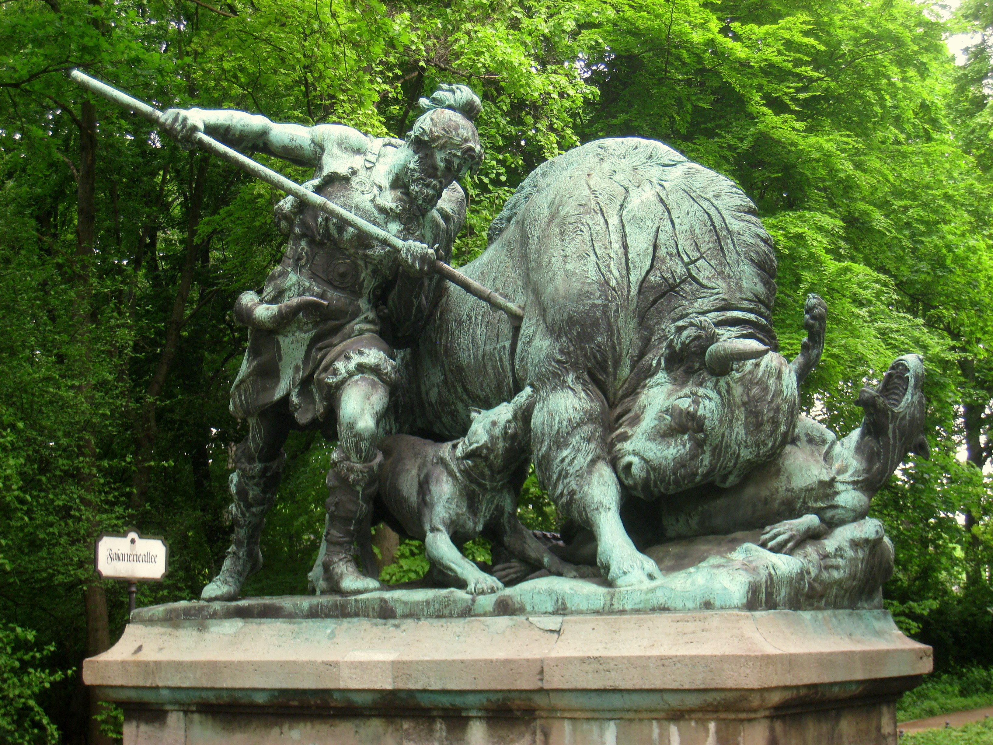 Altgermanische Wisentjagd by Fritz Schaper, Tiergarten, Berlin, Germany.